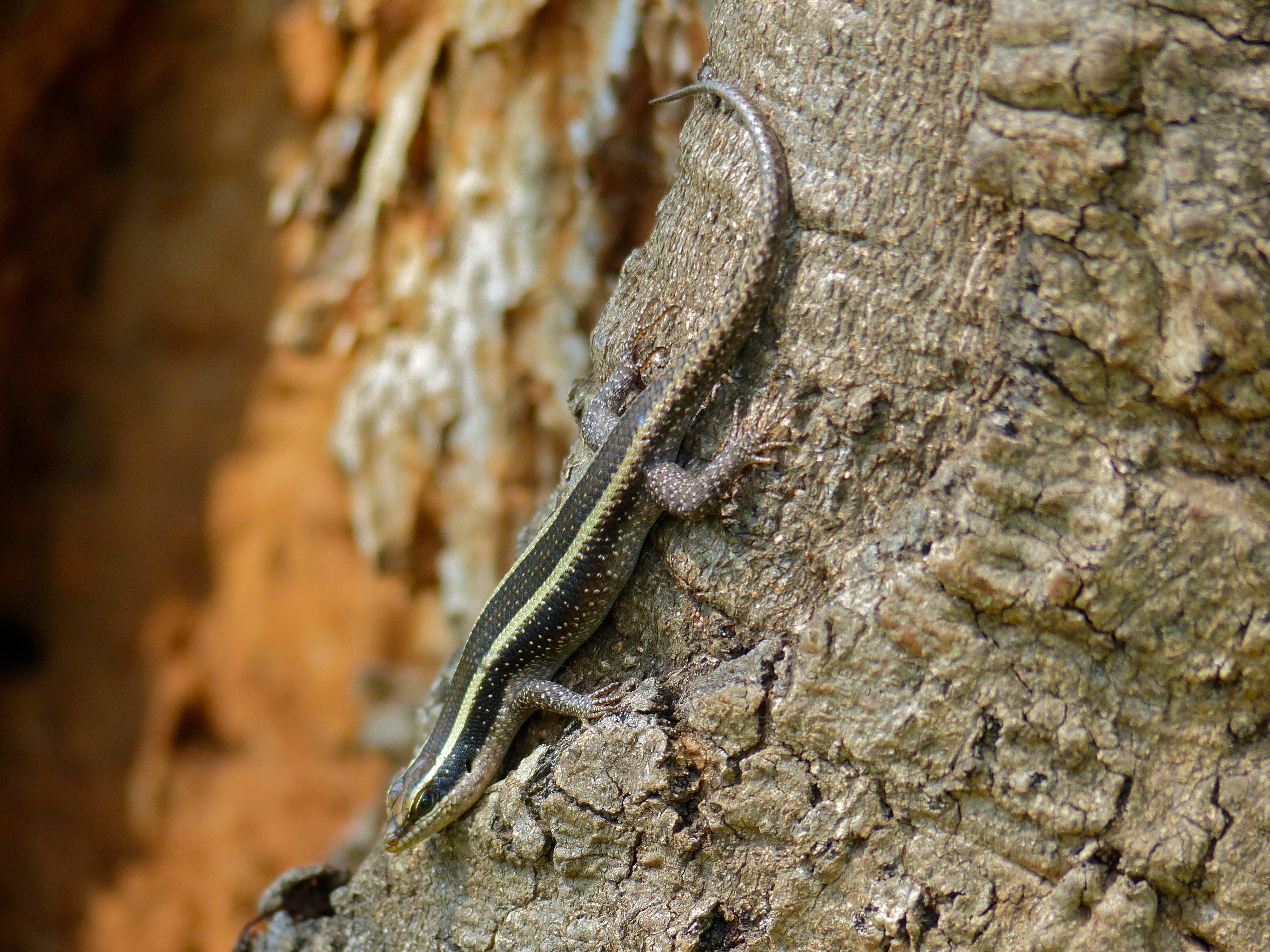 Mahonie Loop near Punda Maria, Kruger NP, SOUTH AFRICA